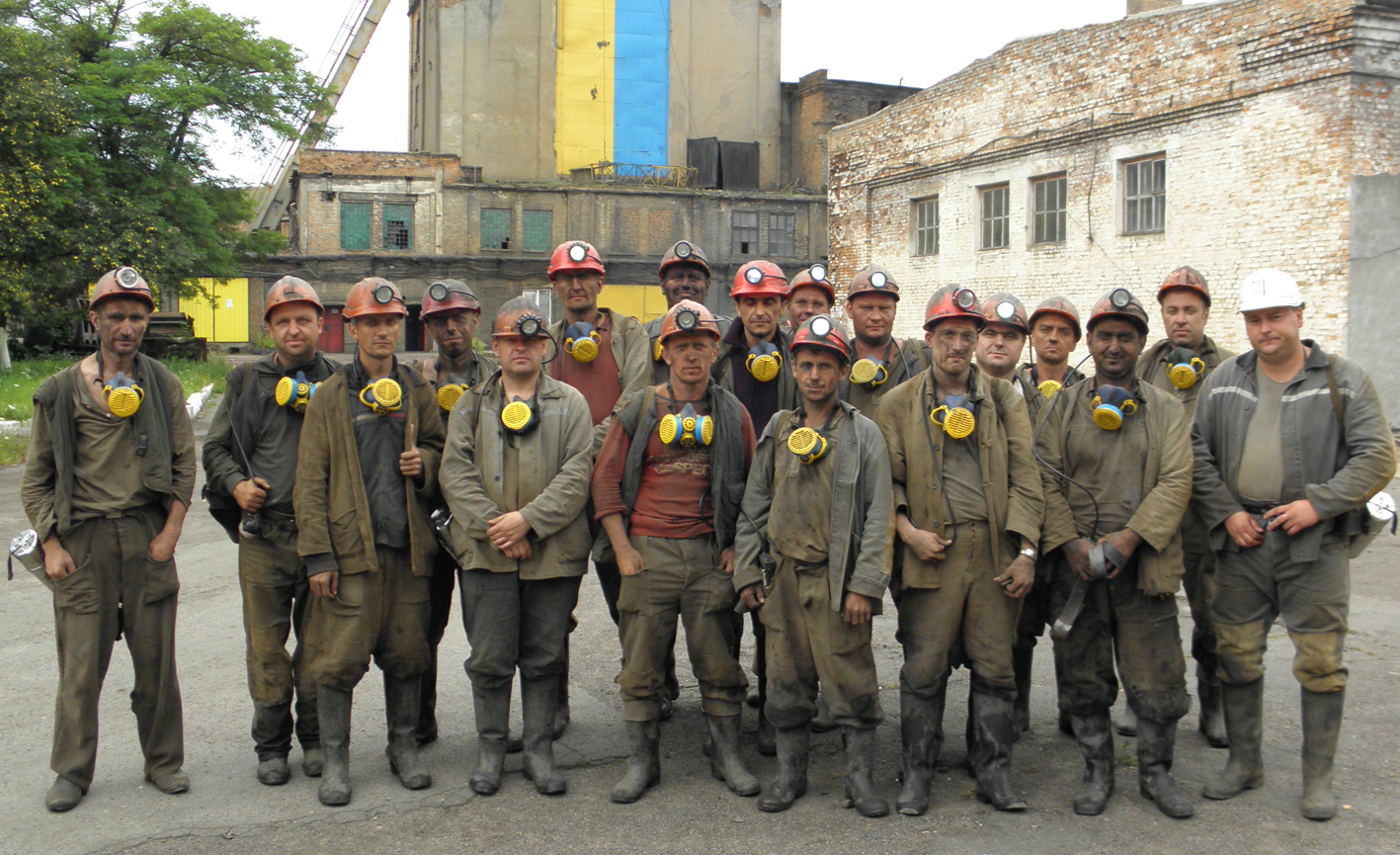 чвмфіи